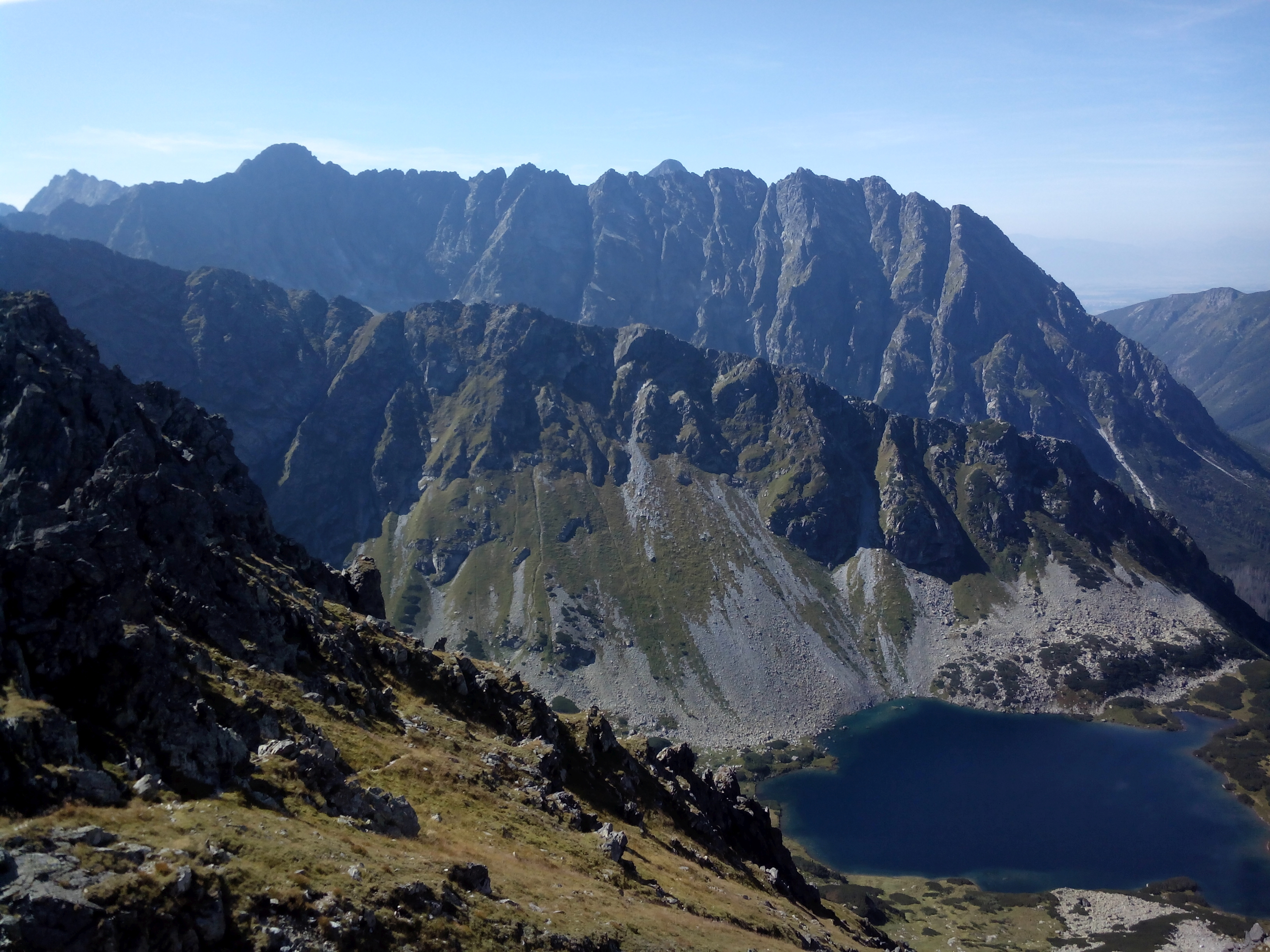 Mur Hrubego, Pośredni Wierszyk i Dolina Ciemnosmreczyńska. Widok z Wrót Chałubińskiego